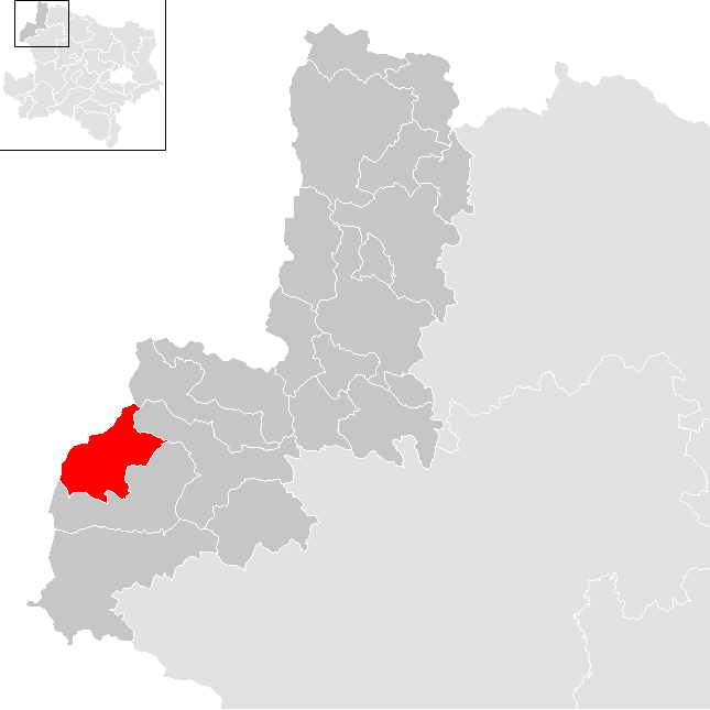 Bezirk Gmünd